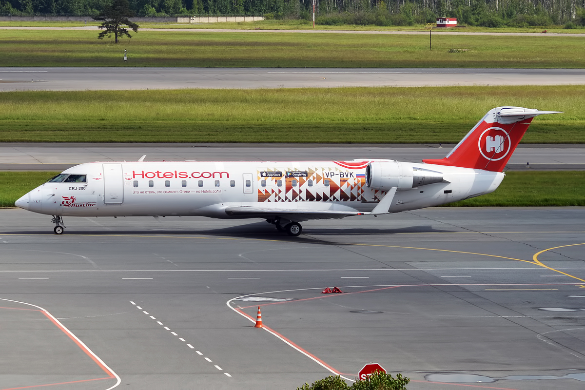 Rusline ( livery), VP-BVK, Bombardier CRJ-100ER